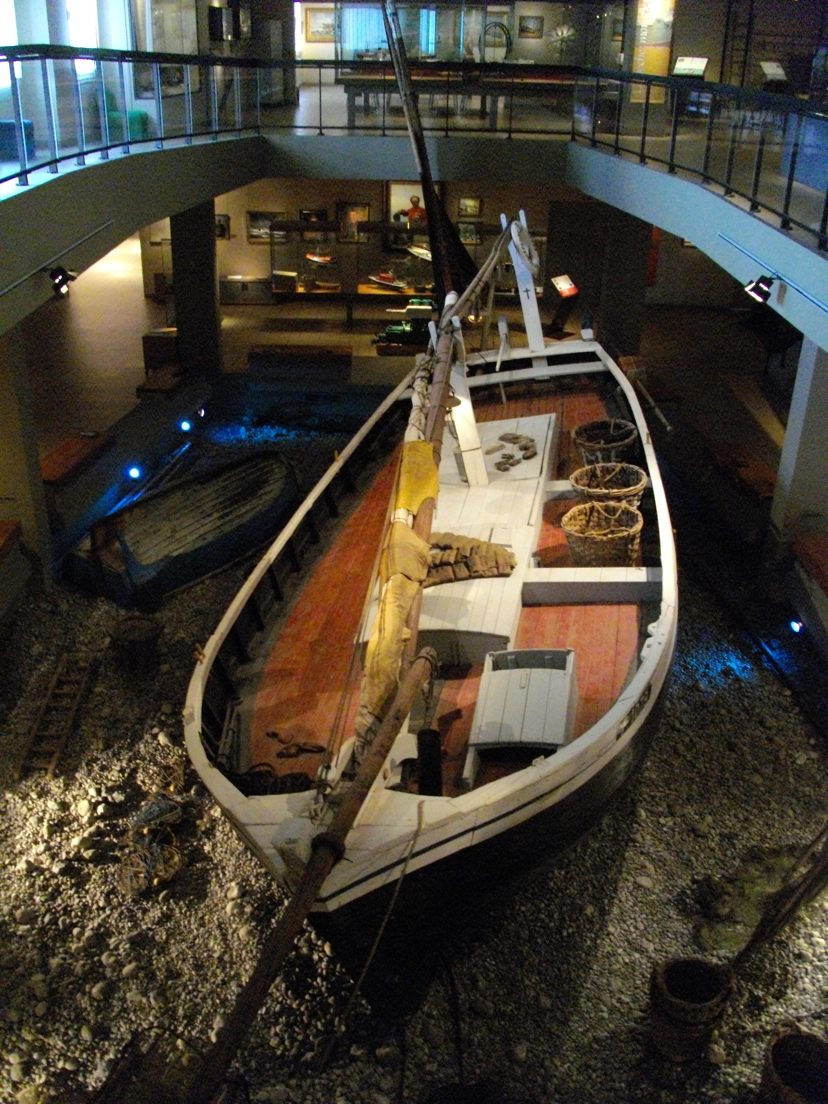 ND de Bonsecours (Musée des Terre-Neuvas à Fécamp)